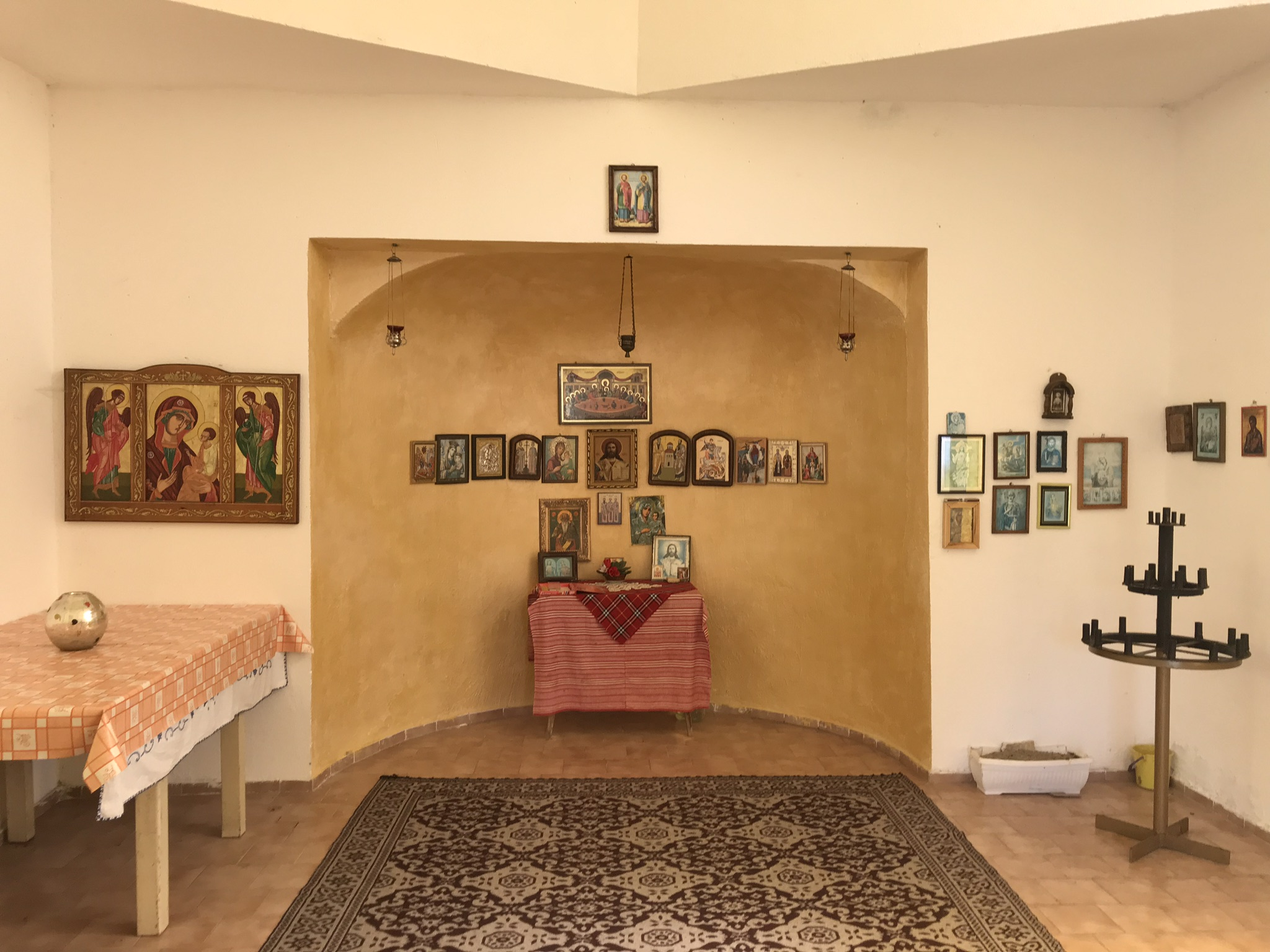 Икони в “Свети Врачове”